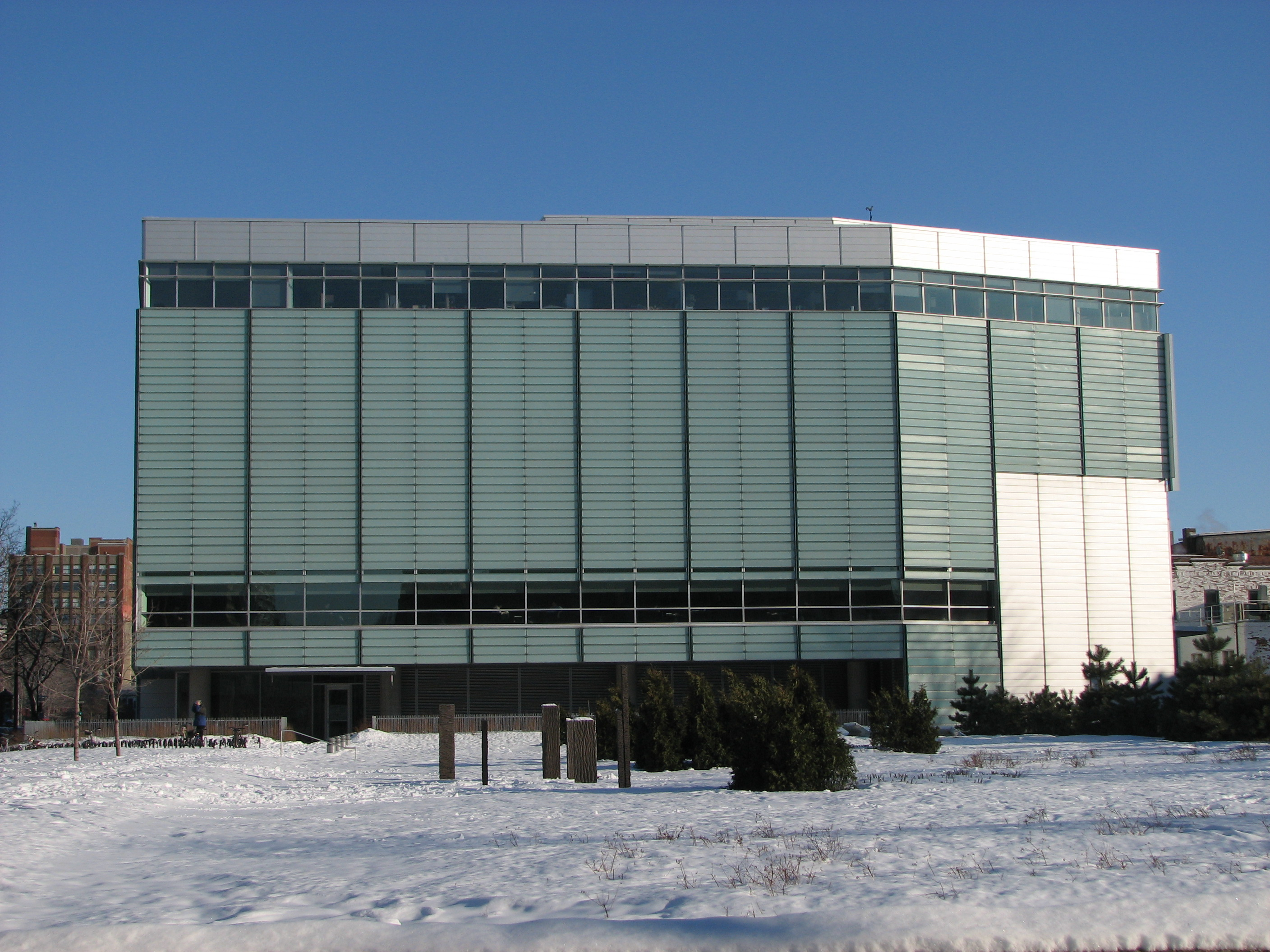 Façade Nord de la Bibliothèque nationale du Québec, rue Berri à Montréal